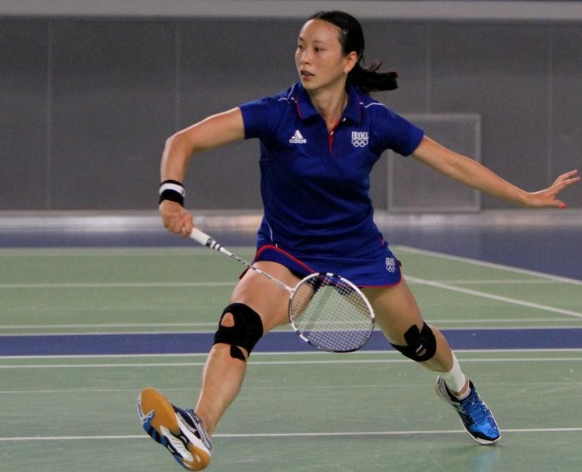 Hongyan Pi à l'entrainement pendant les J.O de Londres 2012.